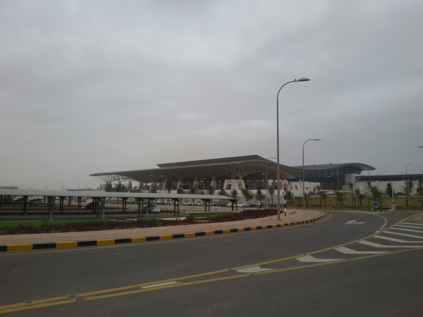 واجهة مبنى المسافرين